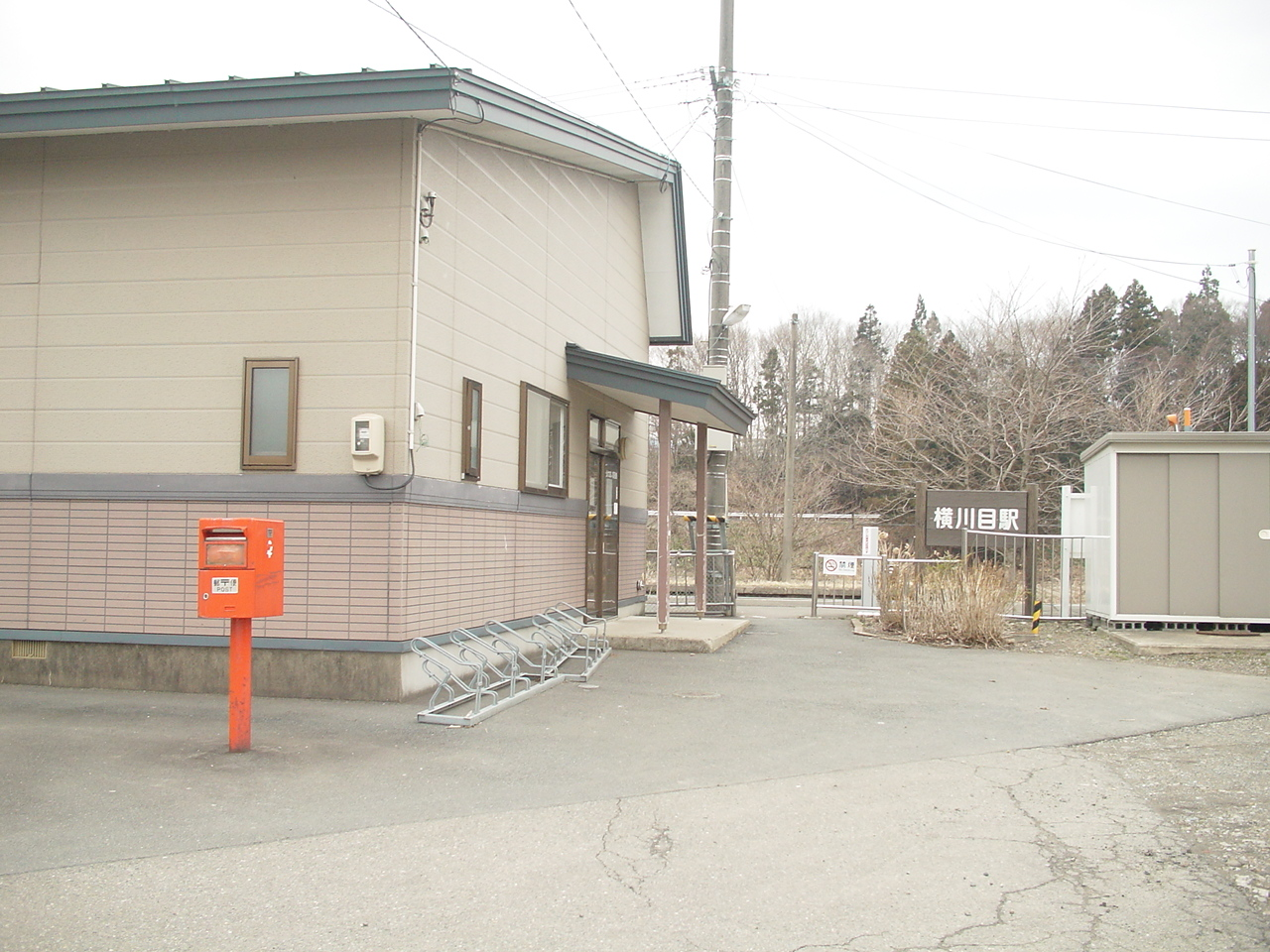 （横川目駅）